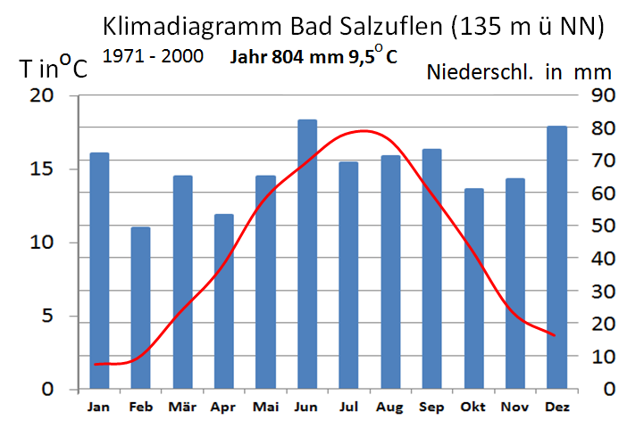 Klimadiagram von Bad Salzuflen